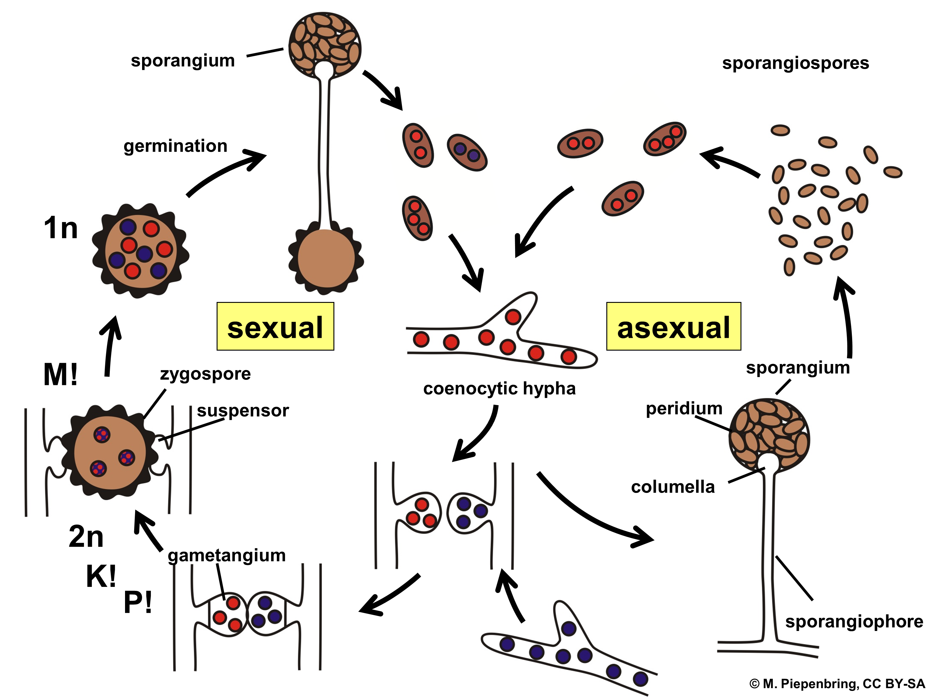 Biologische Schemata, gezeichnet und freigegeben von M. Piepenbring